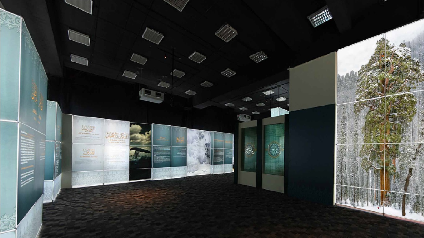 قاعة التعظيم والاجلال معرض أسماء الله الحسنى بالمدينة المنورة